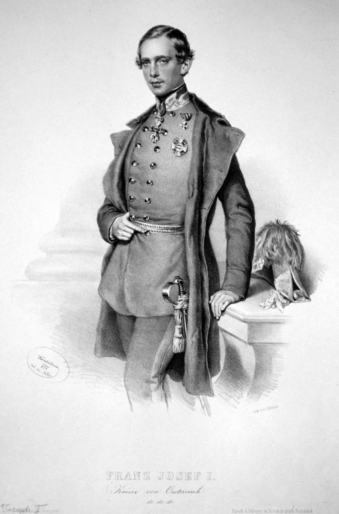 Franz Josef I. (1830-1916), Kaiser von Österreich, König von Ungarn.